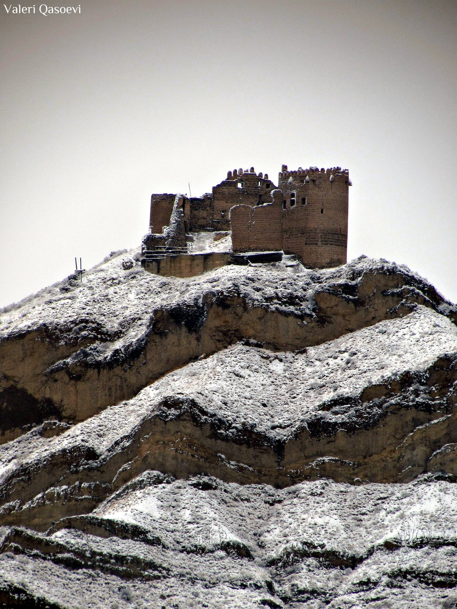 ქსნის ციხე